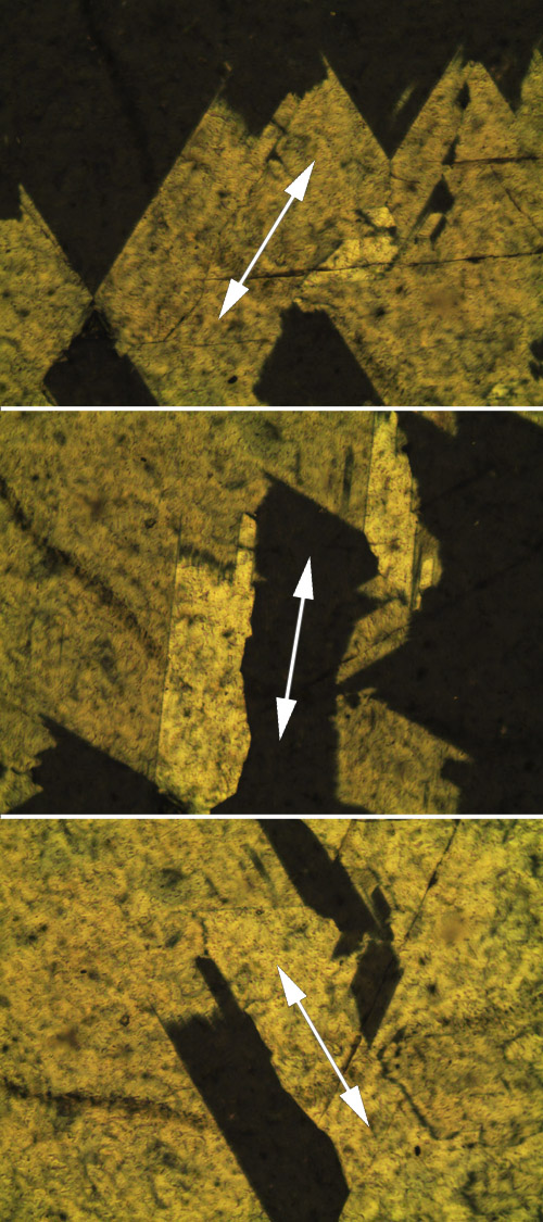 3 imatges en 1 on s'aprecia que la part central d'una macla cíclica d'aragonita conté 3 orientacions cristal·lines i per tant 3 cristalls tal com pertoca a aquesta macla triple